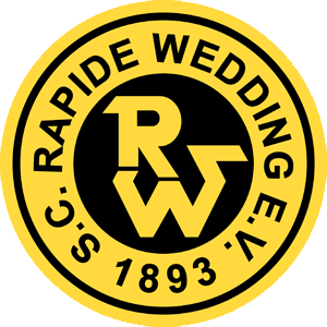 Logo Rapide Wedding